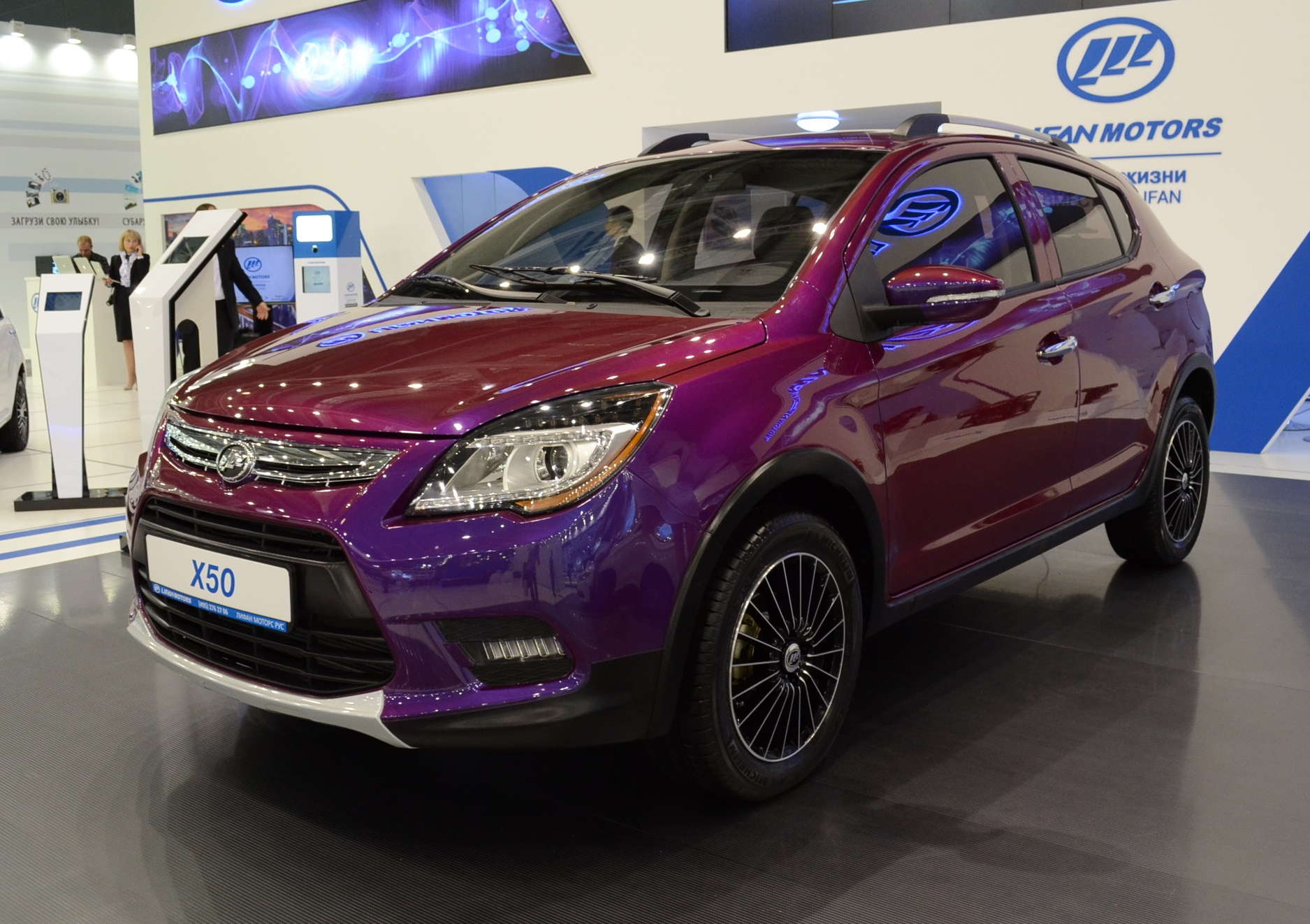 Автомобиль Lifan X50 на Московском автосалоне